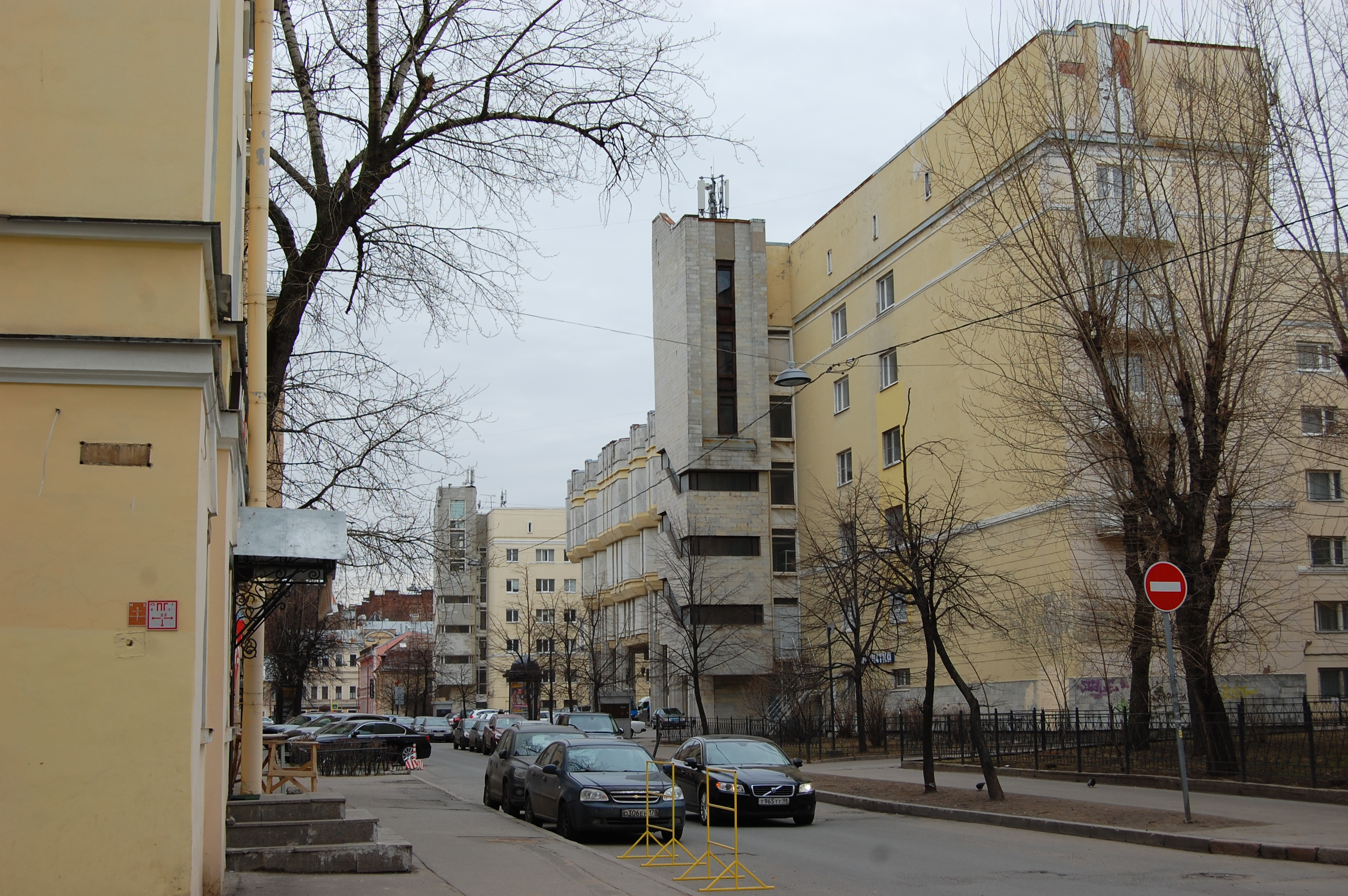 Артиллерийская улица. Вид со стороны улицы Короленко. Справа выделяется комплекс гостиницы Русь